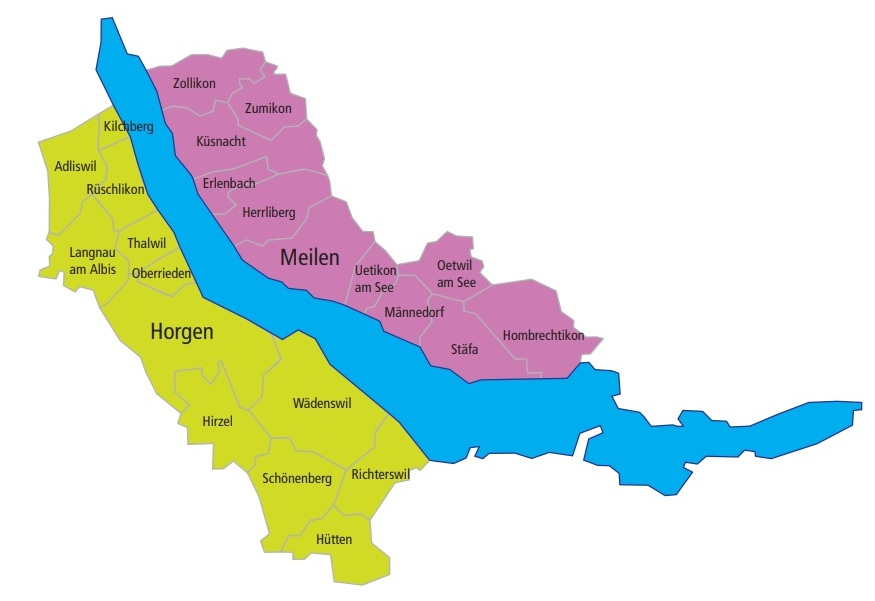 Verbreitungsgebiet Zürcher Regionalzeitungen